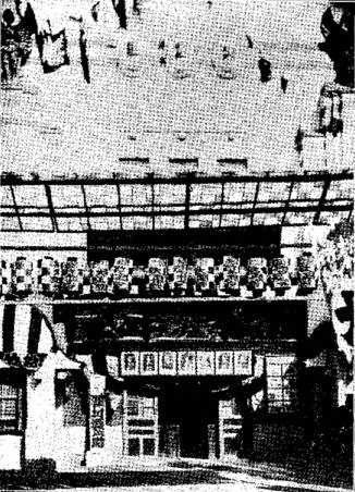 京城府の映画館、大正館、1922年